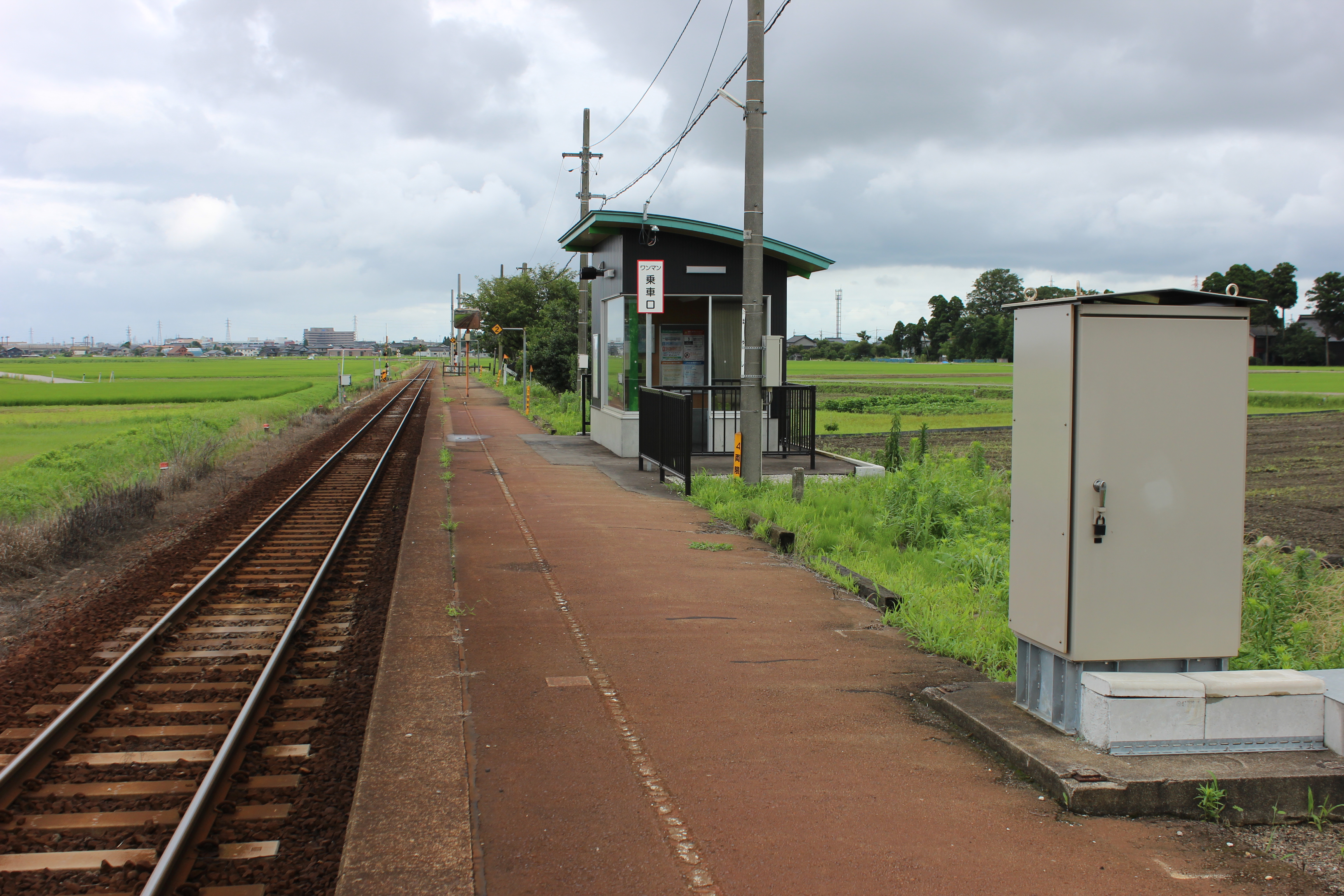 林駅（富山県高岡市）のプラットホームおよび待合室。 Canon EOS Kiss X5